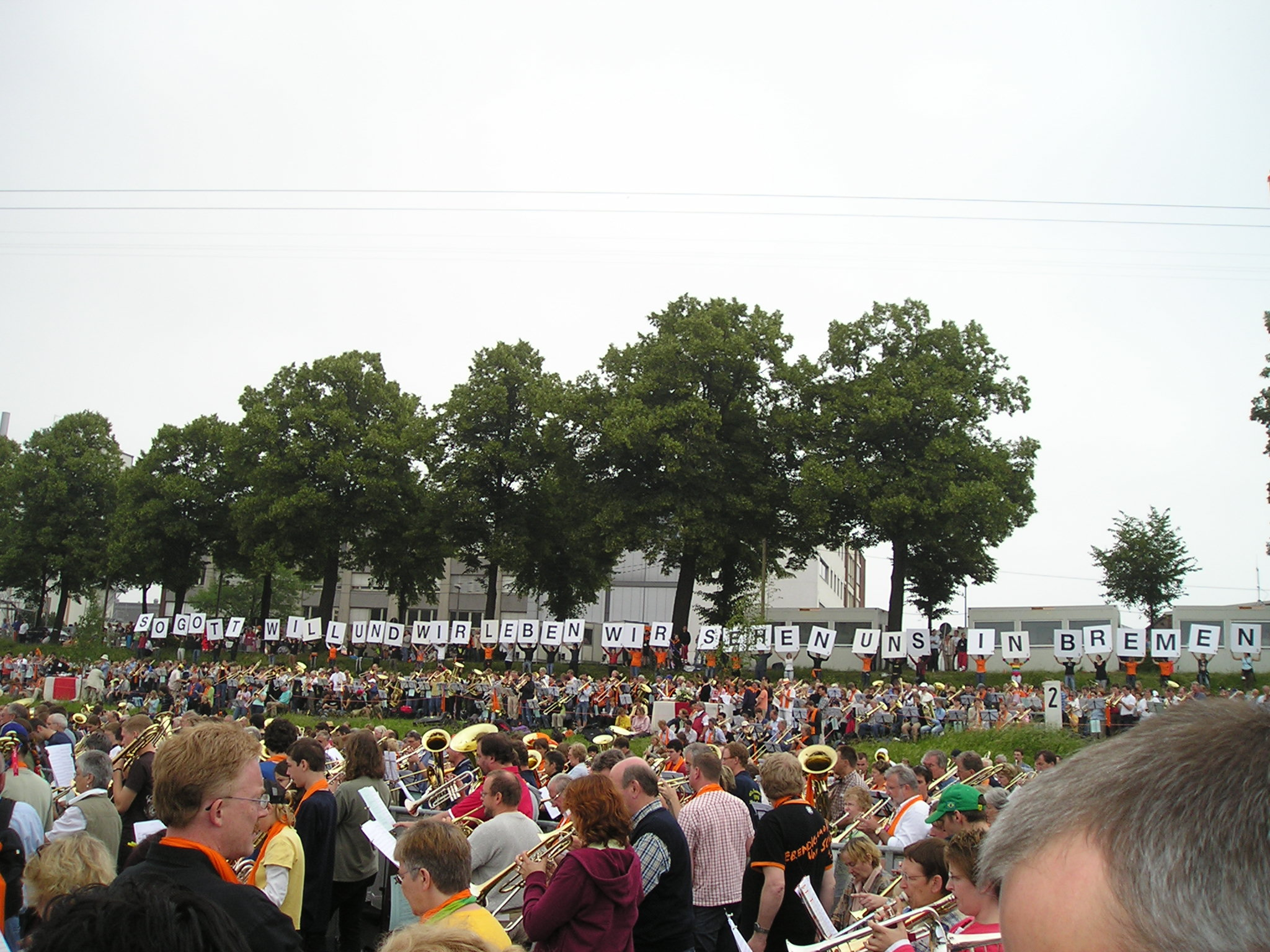 Ende des Abschlussgottesdienst und Ausblick auf die Zukunft: "So Gott will und wir leben, wir sehen uns in Bremen". Der Spruch bezieht sich auf Jak 4,15 LUT. (Conditio Jacobaea)